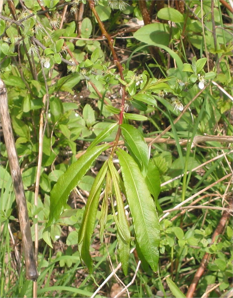 (nl: Bandwilg bladeren) Salix 'Sekka' leaves